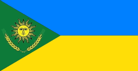 Прапор_Слов'янського_району